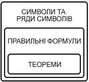 Ця діаграма показує синтаксичні одиниці, які можуть бути побудовані з офіційних мов. Символи і рядки символів можна умовно розділити на ті, що не мають сенсу і добре сформовані формули. Офіційну мову можна розглядати як ідентичну набору правильних формул. Набір правильних формул можна умовно розділити на теореми і не-теореми.